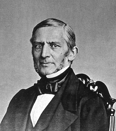 Portrait Adolf Repsold um 1870(Staatsarchiv Hamburg)